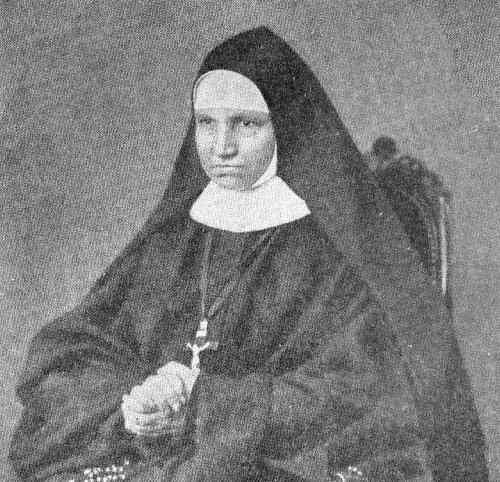 Die elsässische Ordensgründerin Elisabeth Alphonsa Maria Eppinger (1814-1867)